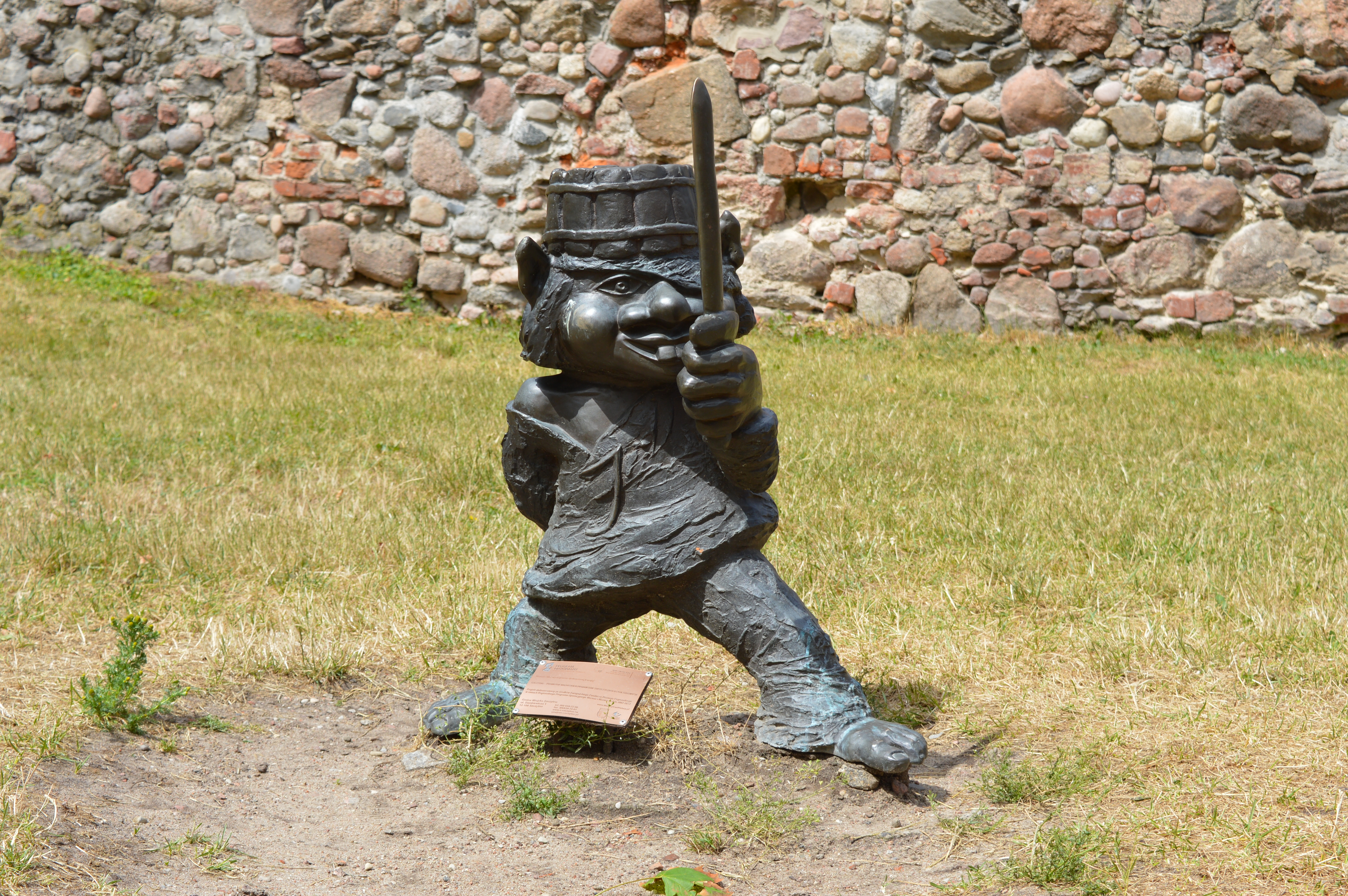 Rzeźba Pofajdoka Juranda ze Spychowa w ruinach zamku w Szczytnie